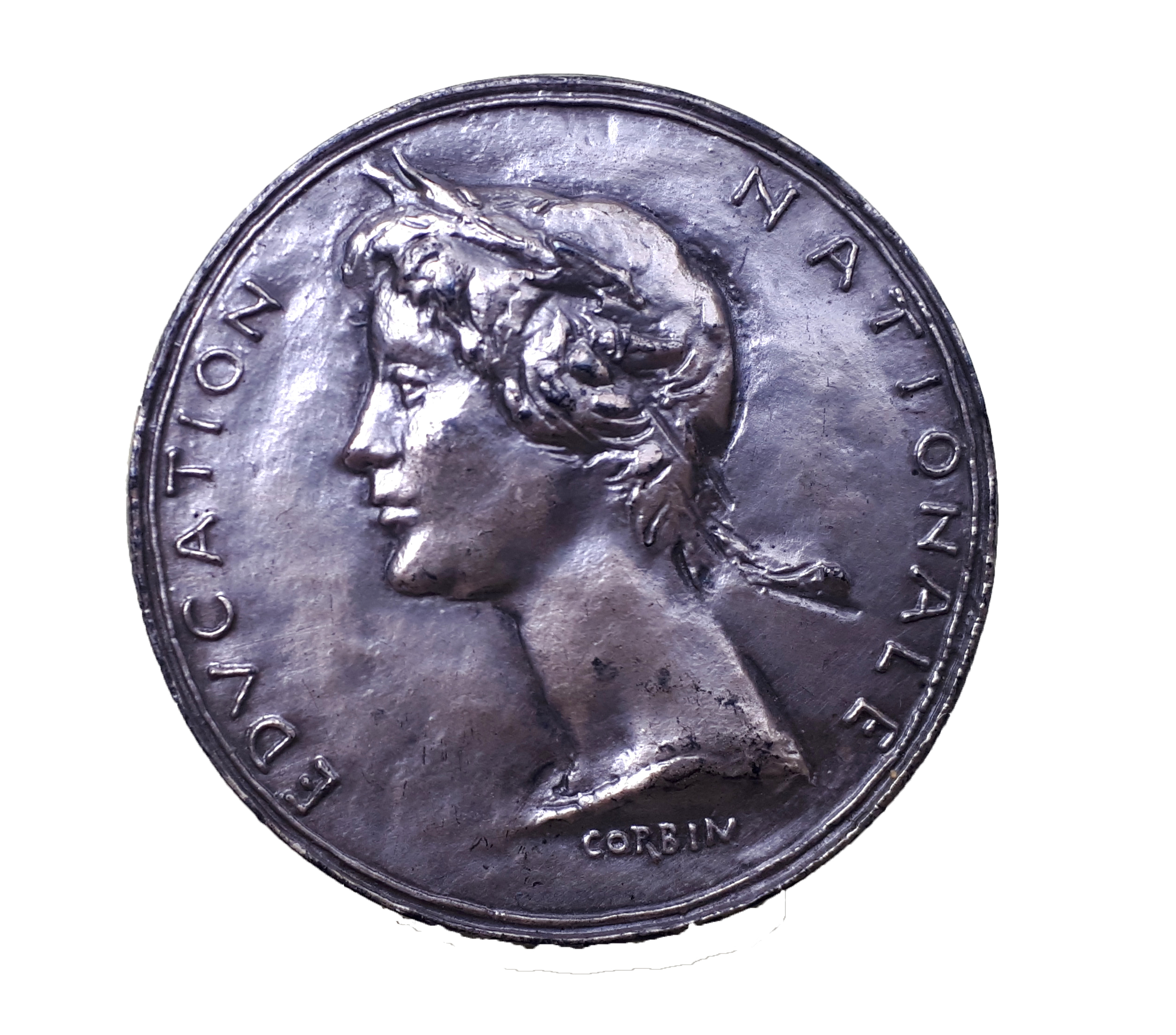 Médaille Palmes académiques